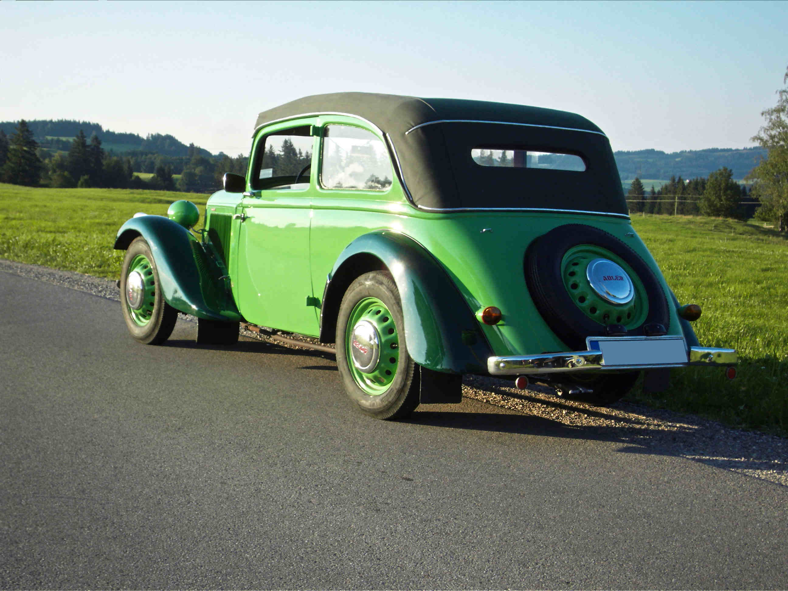 Adler Trumpf Junior Cabrio Limousine, Karosserie Ambi Budd, Baujahr 1939